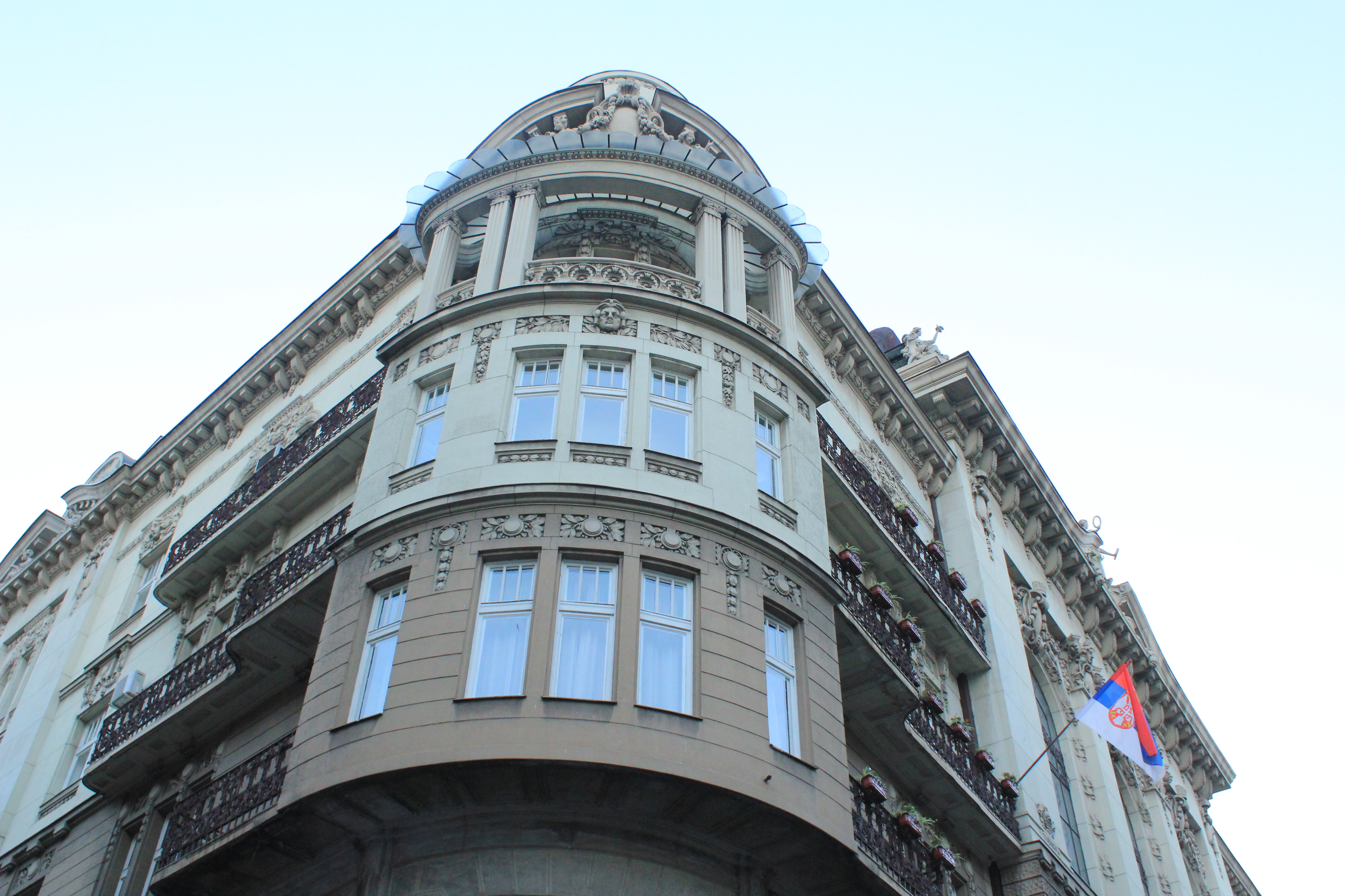 Palata SANU